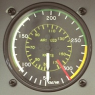 Anémomètre (ou badin) de DR400. Celui-ci possède une double graduation, en kilomètre à l'heure (chiffres blancs) et en nœuds (chiffres jaunes plus près du centre). Les traits et arcs de couleurs indiquent les différentes vitesses maximales et minimales de l'avion : Trait rouge : VNE (vitesse à ne pas dépasser), ici 308 km/h ; Fin de l'arc vert, début de l'arc jaune : VNO (vitesse limite en atmosphère turbulente), ici 260 km/h ; Fin de l'arc blanc : VFE (vitesse limite avec les volets), ici 170 km/h ; Début de l'arc vert : VS1 (vitesse de décrochage en lisse), ici 105 km/h ; Début de l'arc blanc : VS0 (vitesse de décrochage avec les volets), ici 95 km/h. Didier Halatre, 2004.